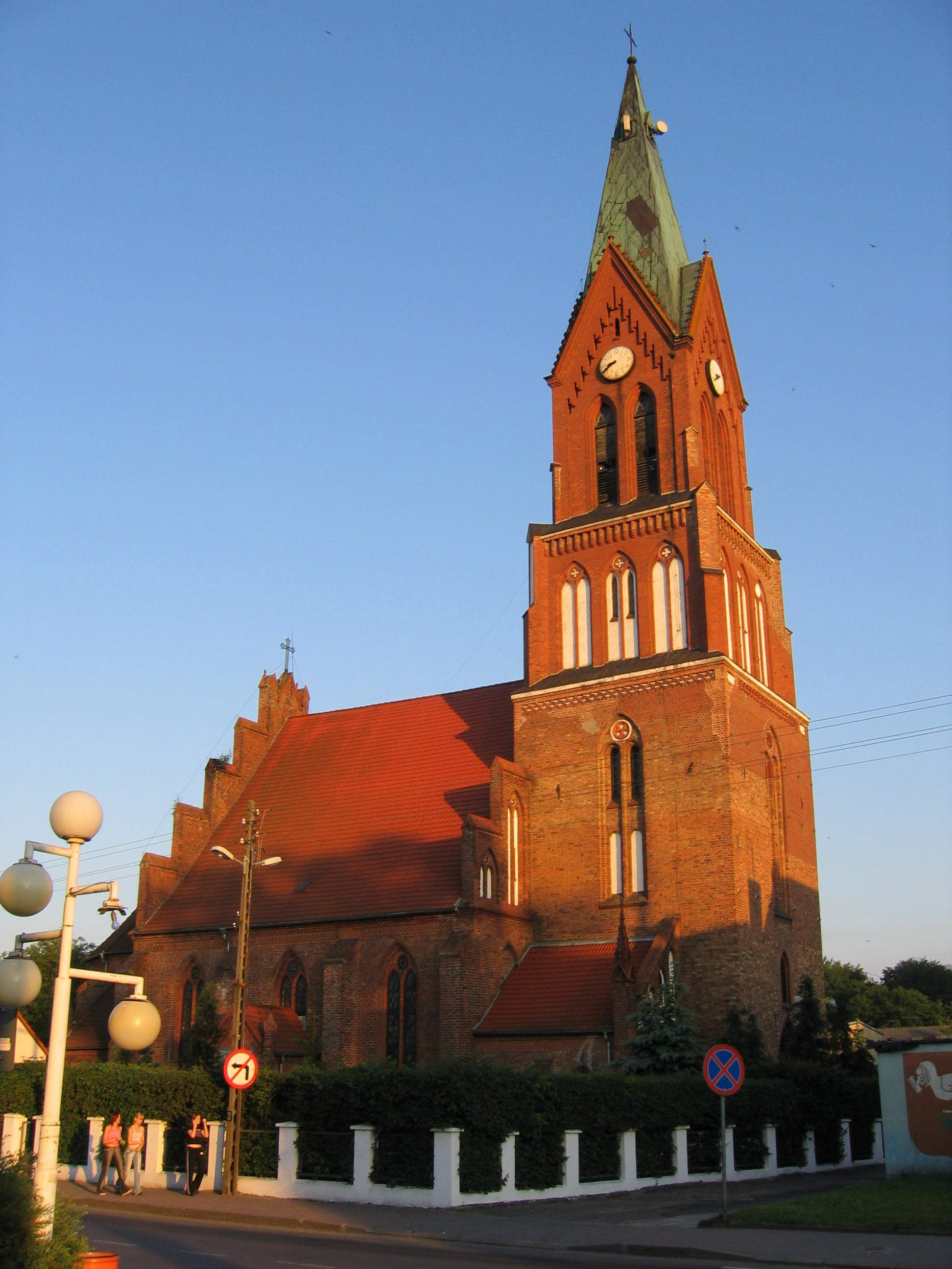 Resko - kościół pw. Niepokalanego Poczęcia NMP (zabytek nr 337)